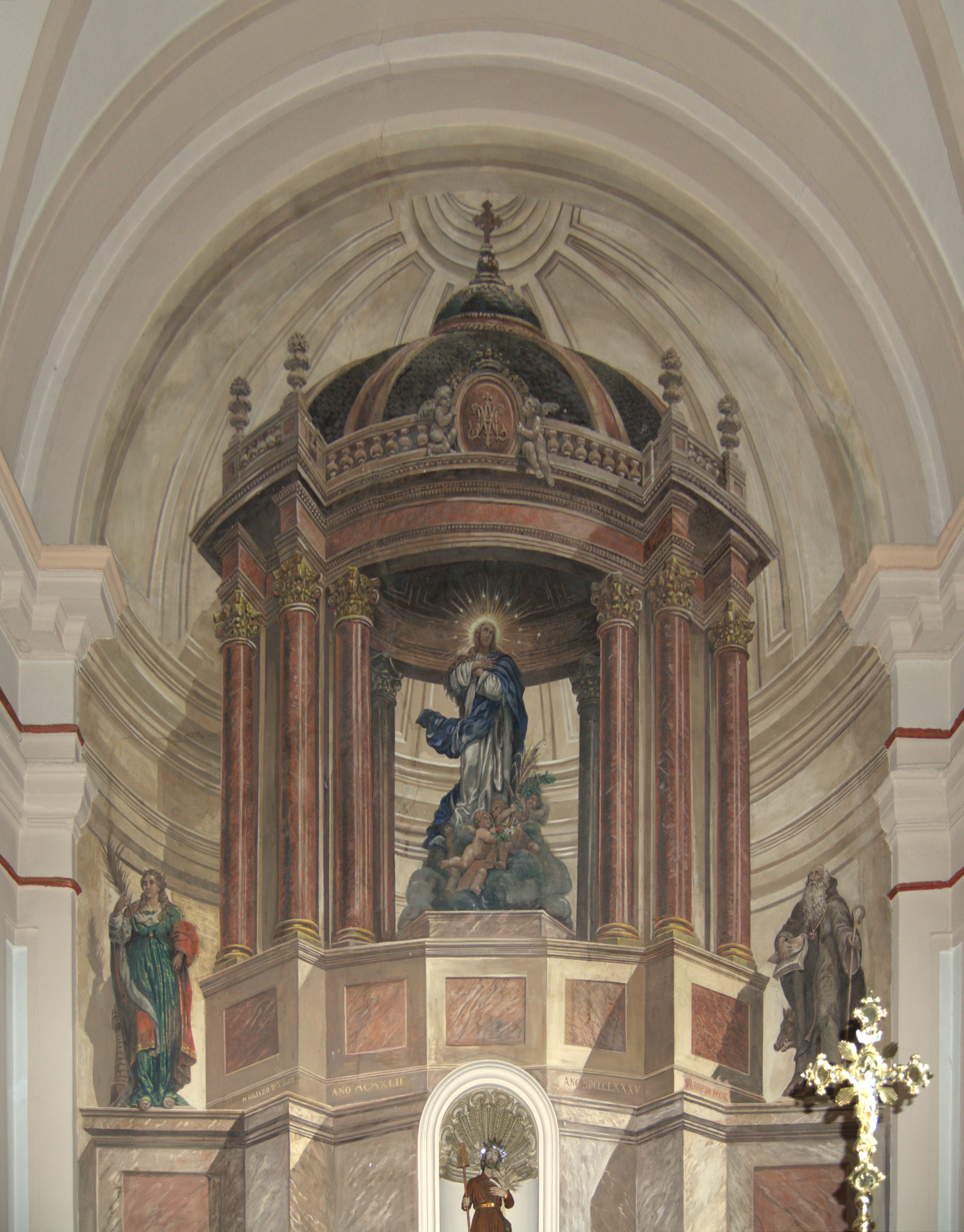 Retablo fingido en el altar de la Ermita de San Isidro de Alcalá de Henares. Pintado por Manuel Laredo en 1885.